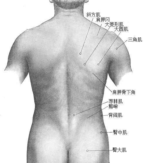 背部表面解剖学